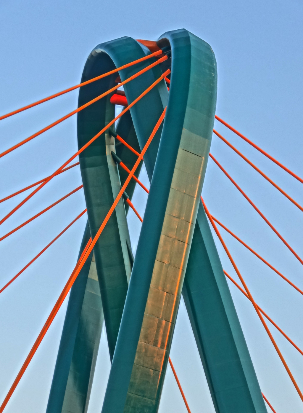 Pylon Trasy Uniwersyteckiej w Bydgoszczy